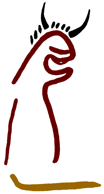 Antropomorfo del panel 77 en la Galería C (tercer santuario) de la Cueva de La Pasiega, en el monte Castillo, localidad de Puente Viesgo (Cantabria, España)